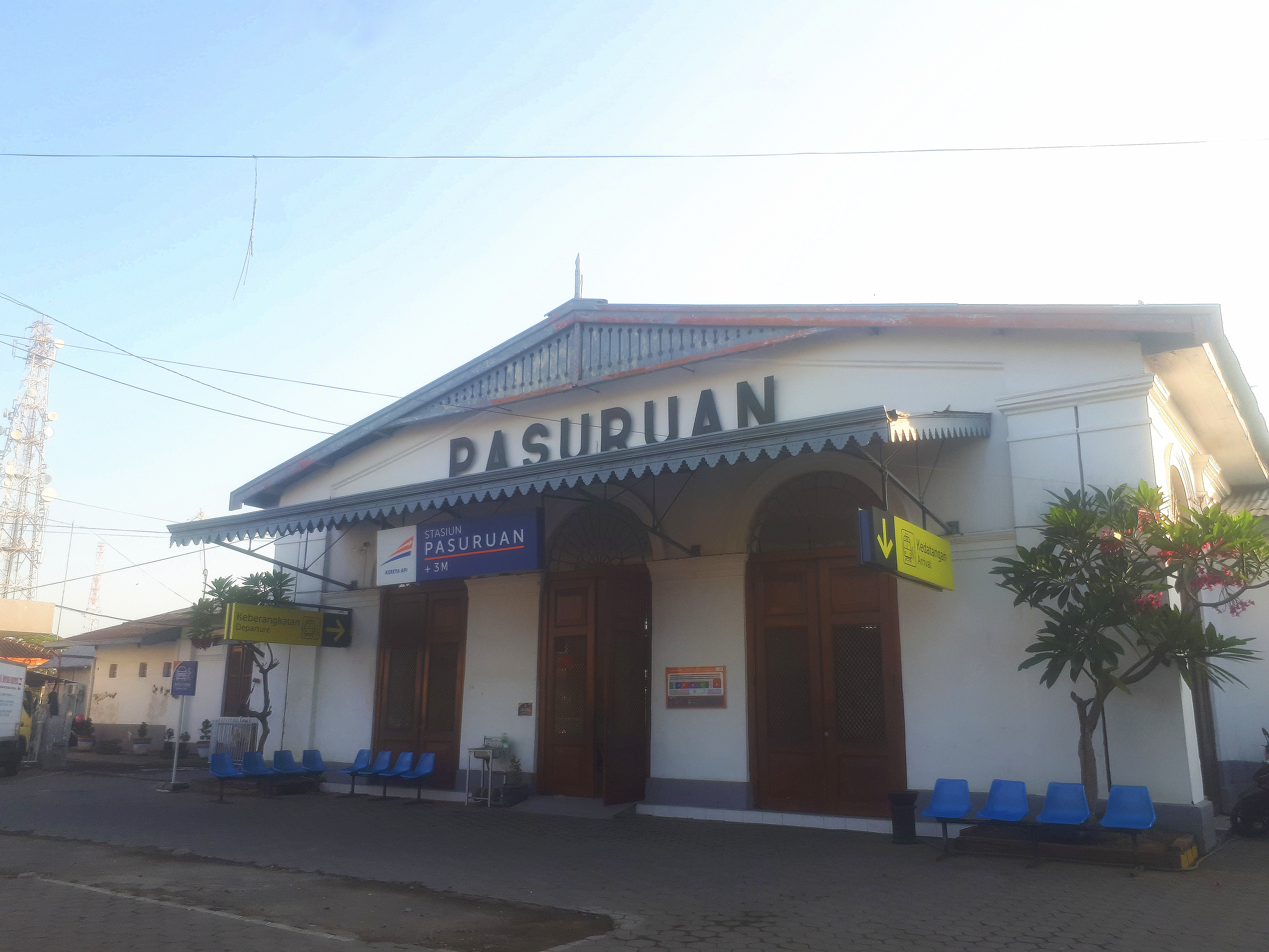 Tampak depan Stasiun Pasuruan,2020